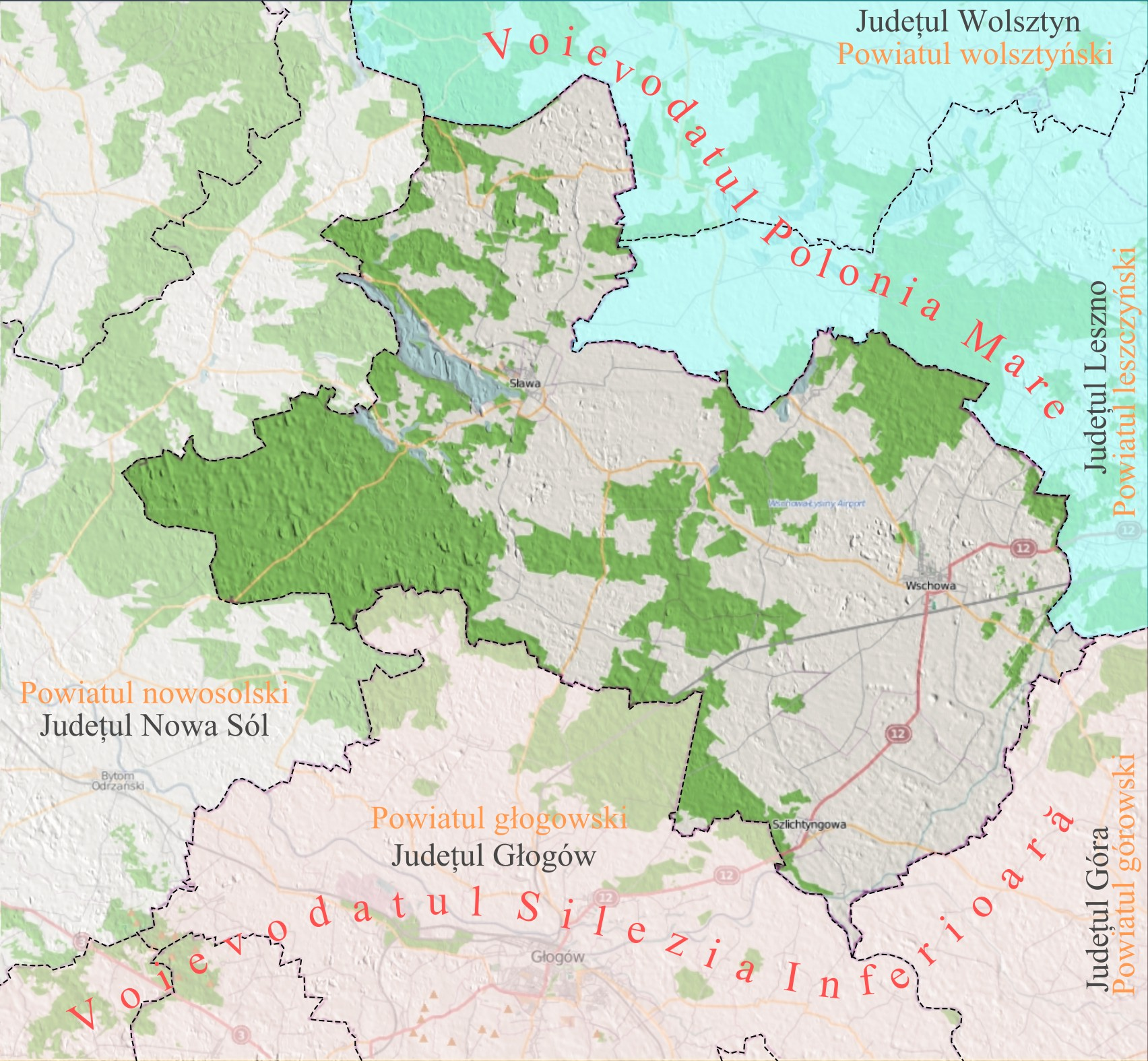 Harta de localizare a Judeţului Wschowa din Voievodatul Poloniei, Lubusz. Coordonate: Top: 52.025 Bottom: 51.625 Left: 15.75 Right: 16.45